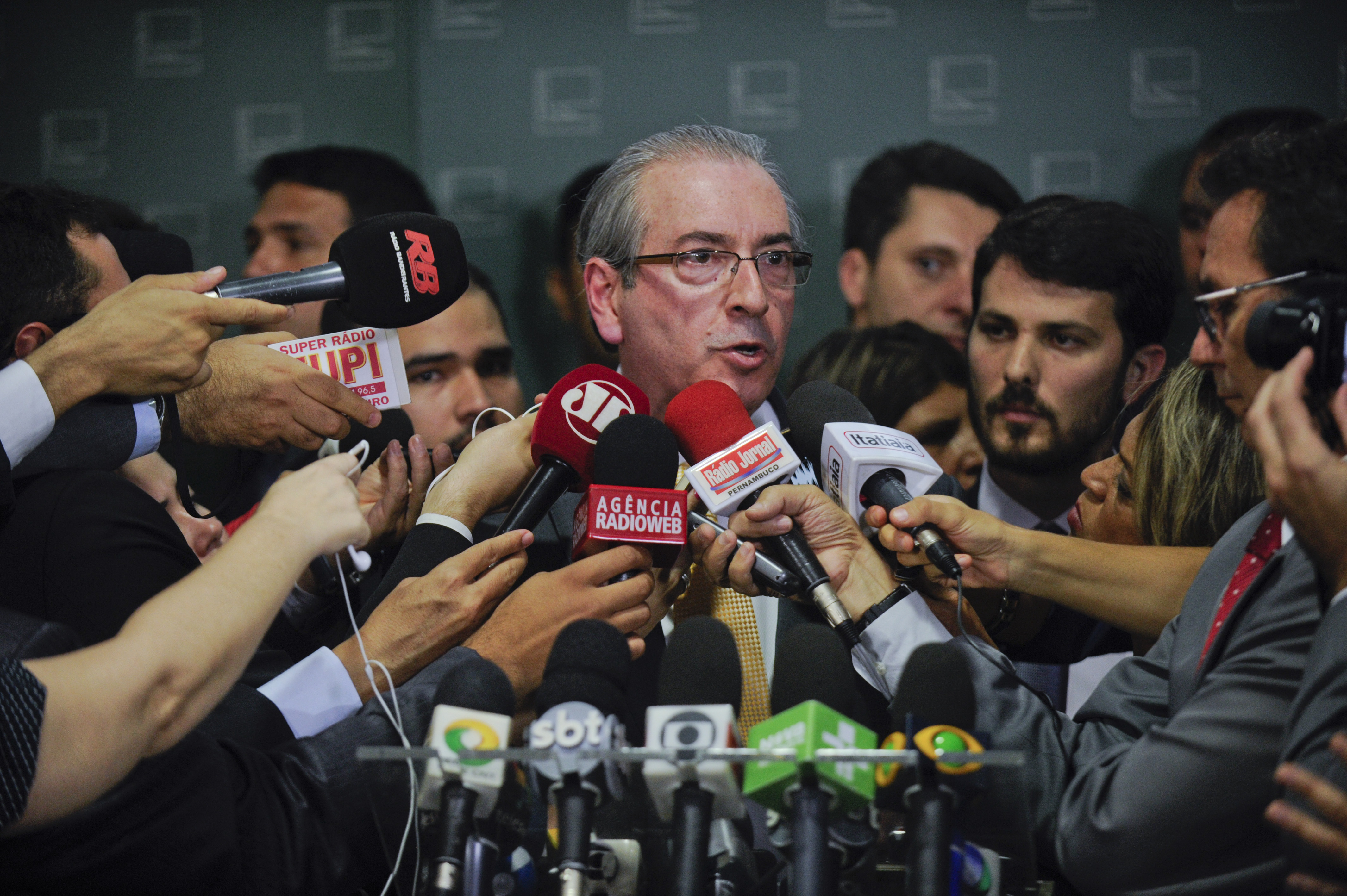 O presidente da Câmara dos Deputados, Eduardo Cunha (PMDB-RJ), informa que autorizou a abertura do processo de impeachment da presidente Dilma Rousseff. Foto: Jefferson Rudy/Agência Senado